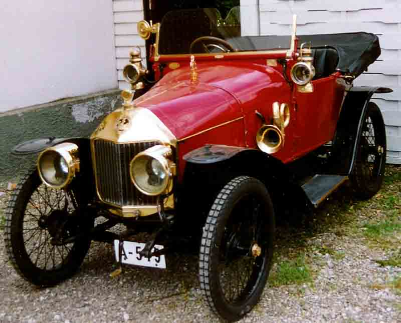 Le Zebre Model C Torpedo 1913